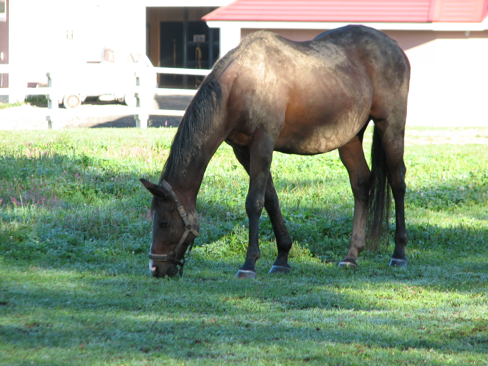 放牧中のダイユウサク。